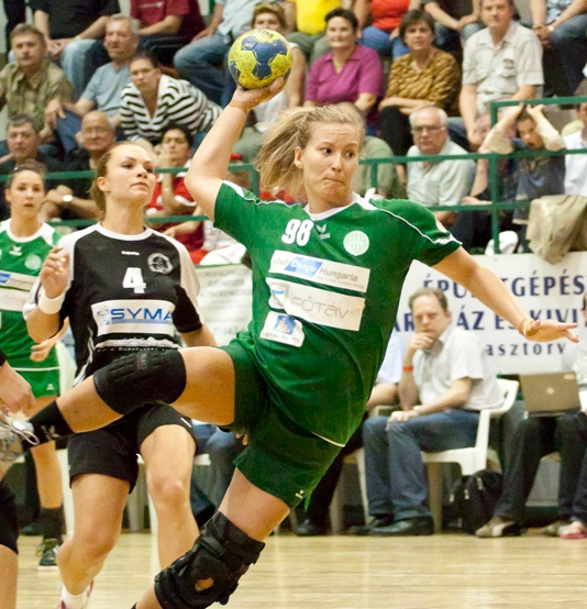 Szamoránsky Piroska, magyar válogatott kézilabdázó.